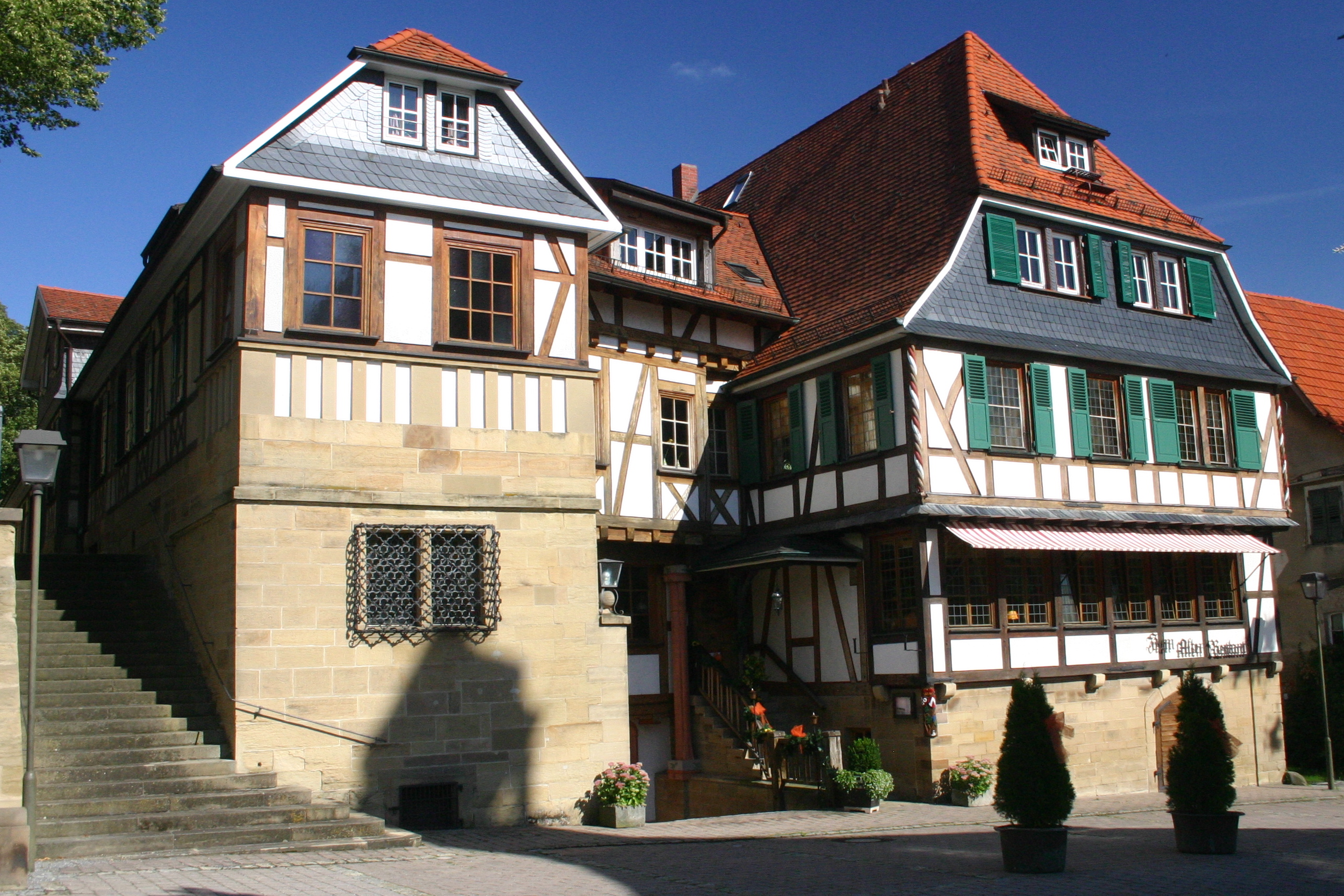 Altes Rentamt Schwaigern